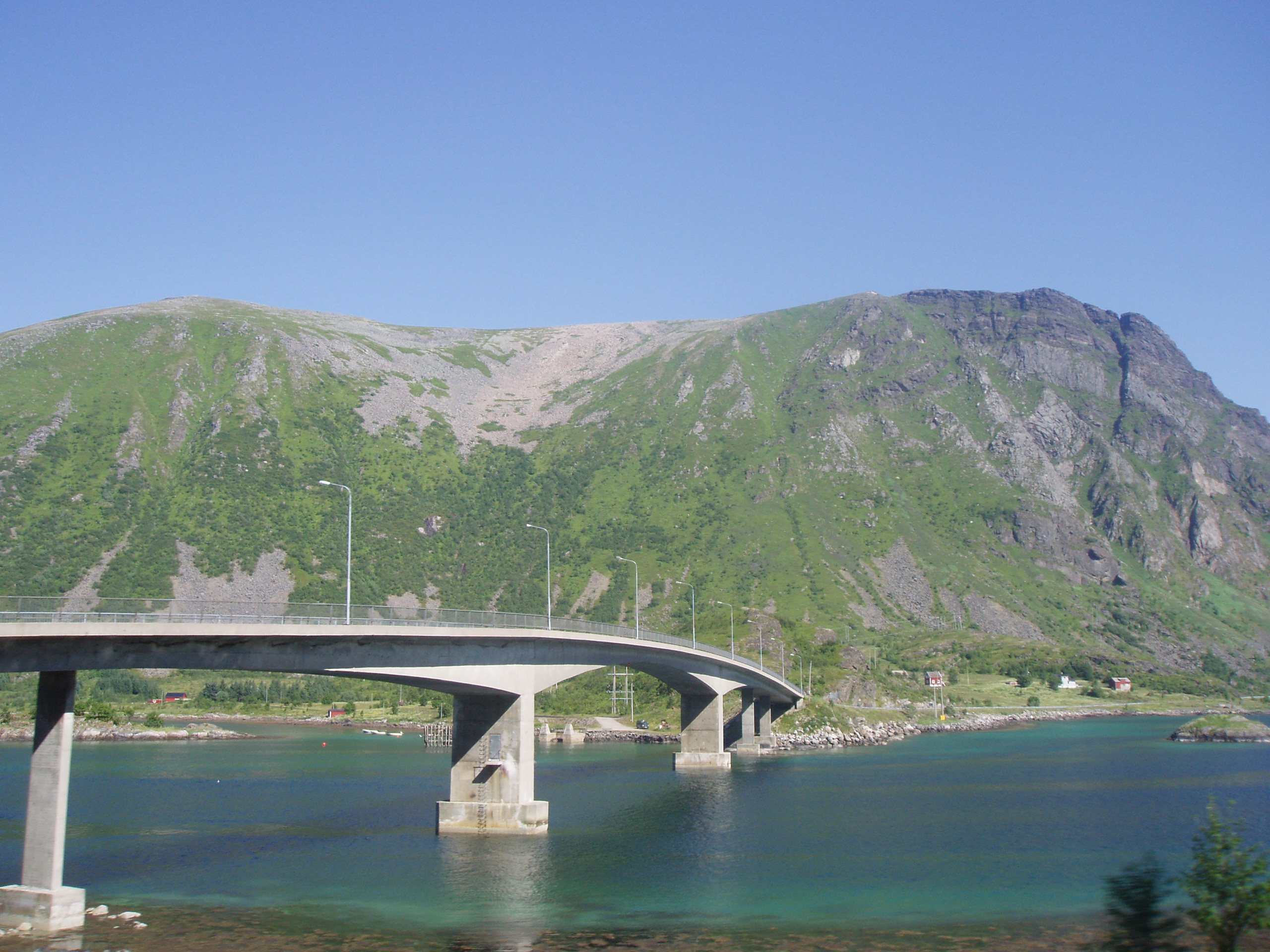 Sundklakkstraumen bridge between Gimsøya and Vestvågøya in Lofoten